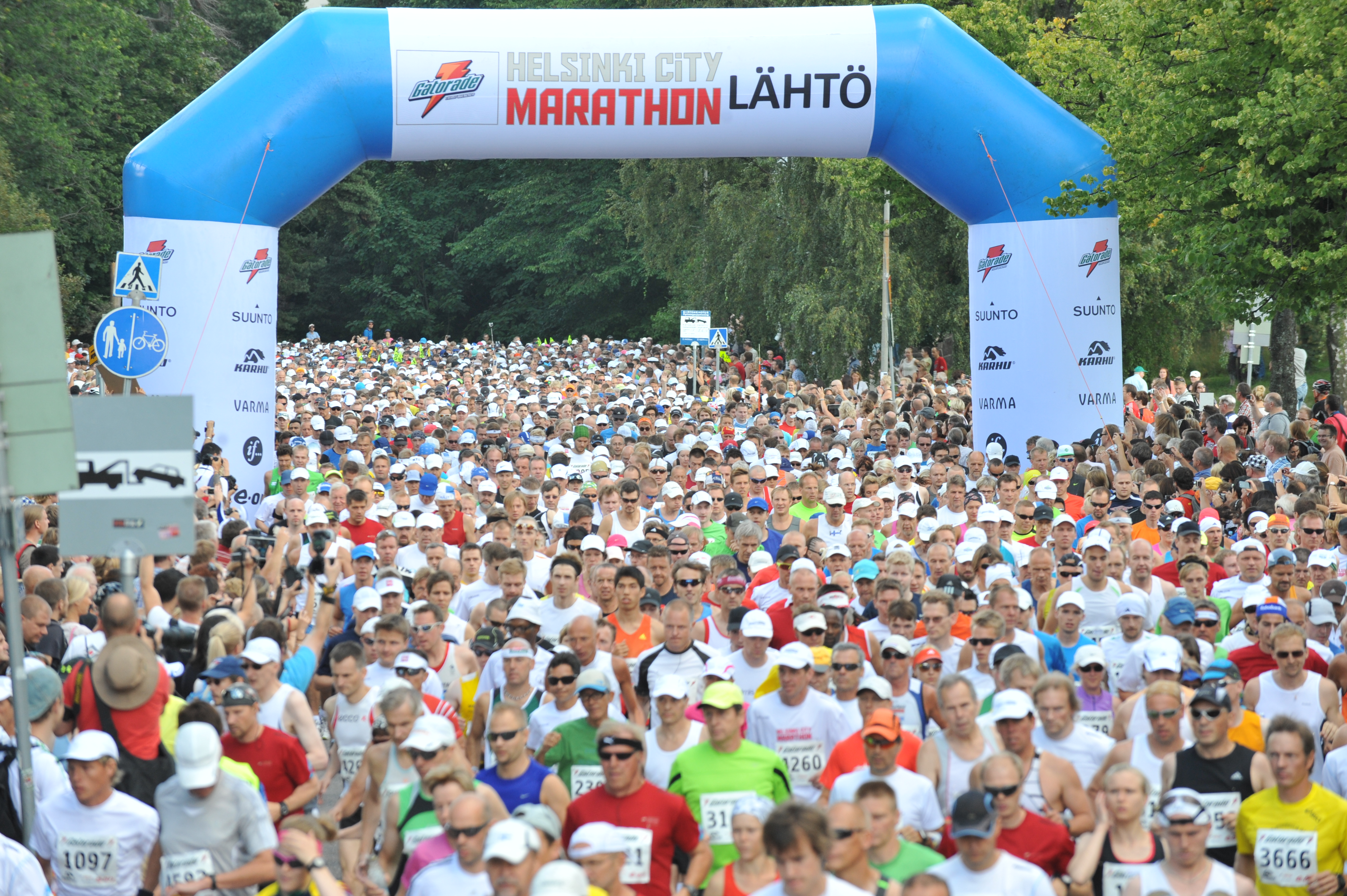 Helsinki City Marathonin lähtöfiiliksiä